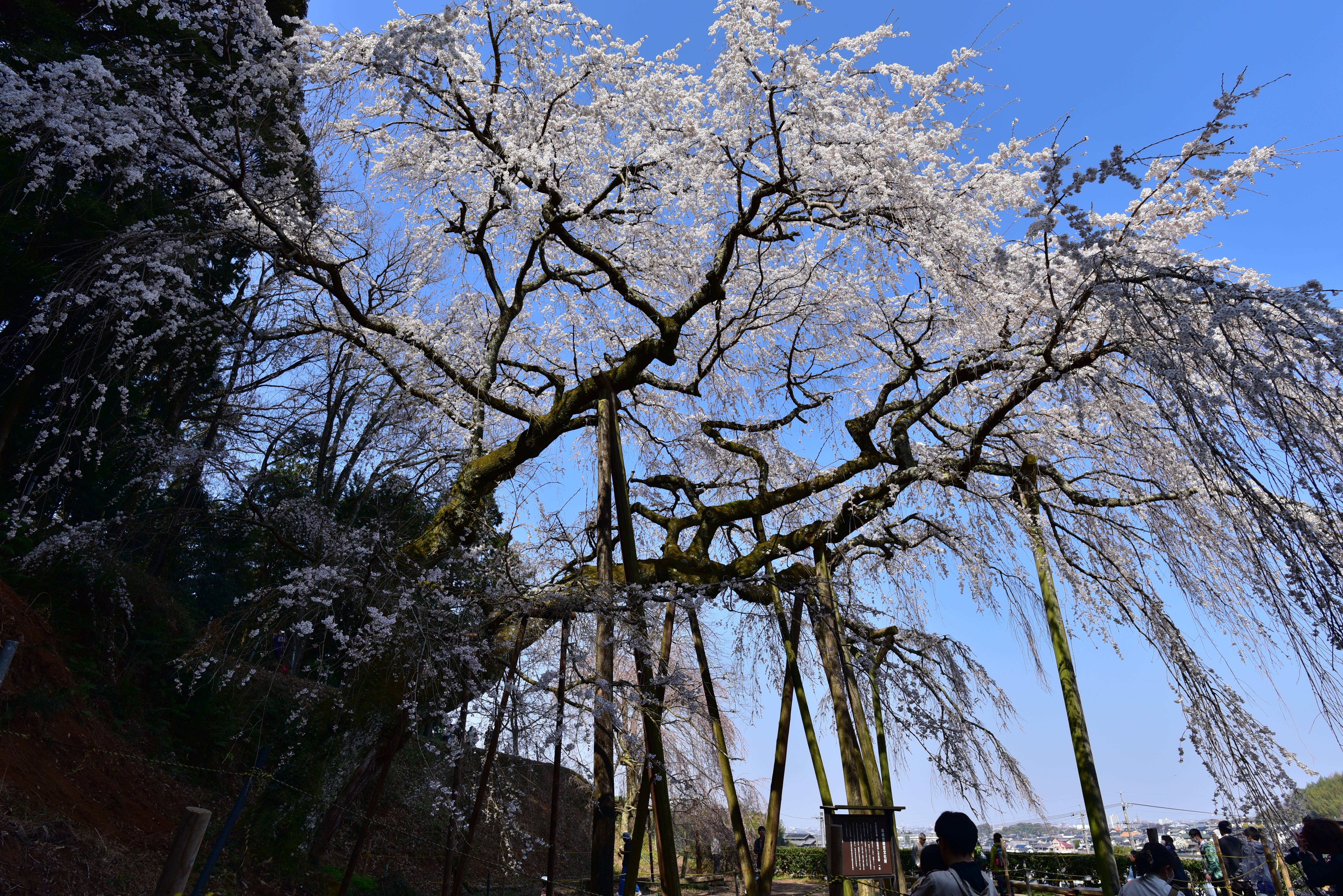 奥山田のしだれ桜